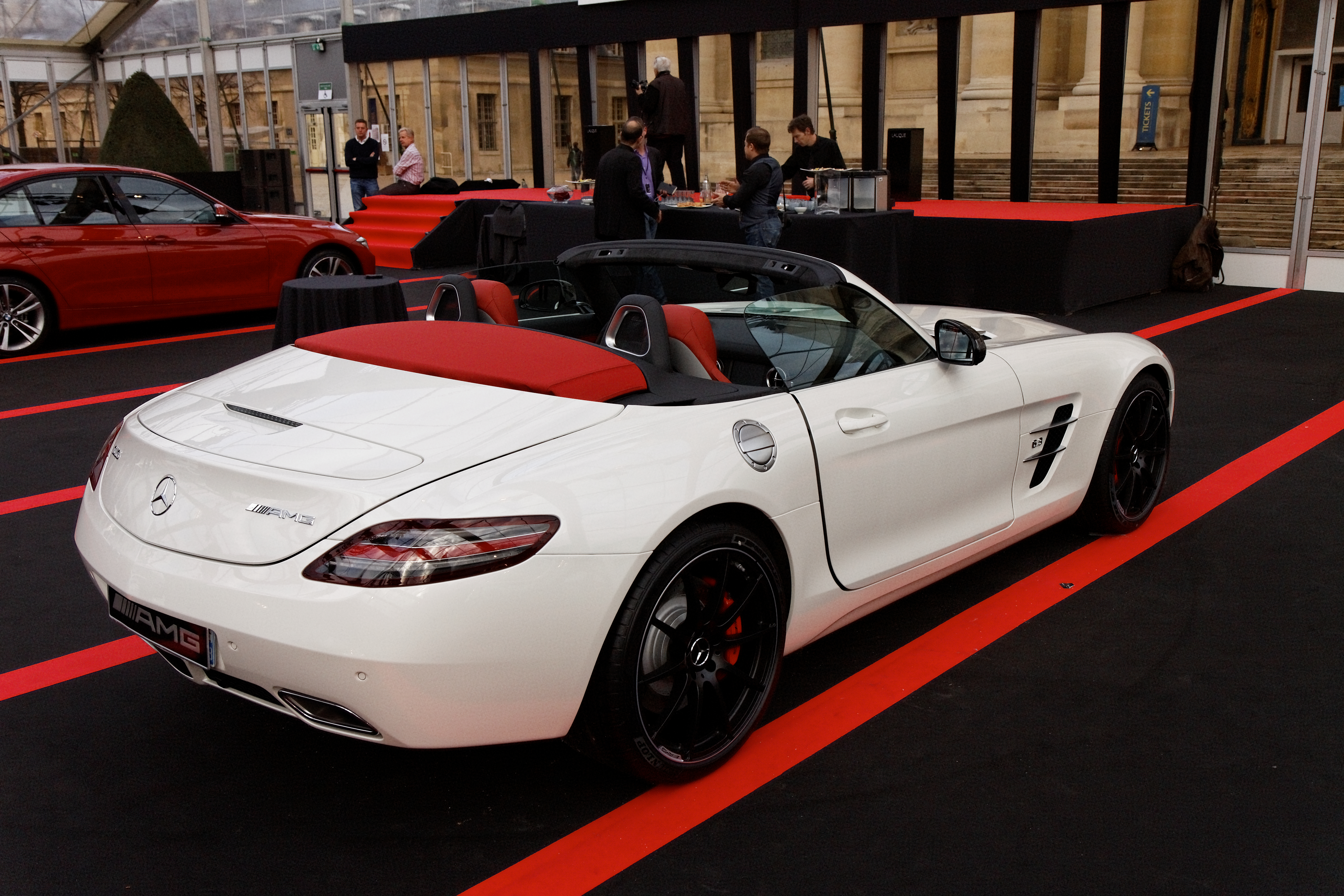 Mercedes AMG SLS